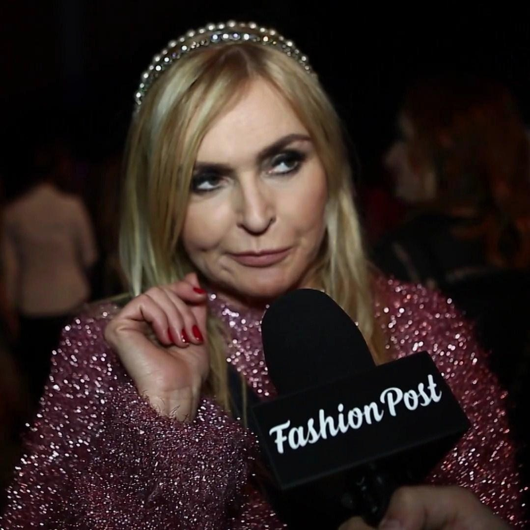 Monika Olejnik, dziennikarka.